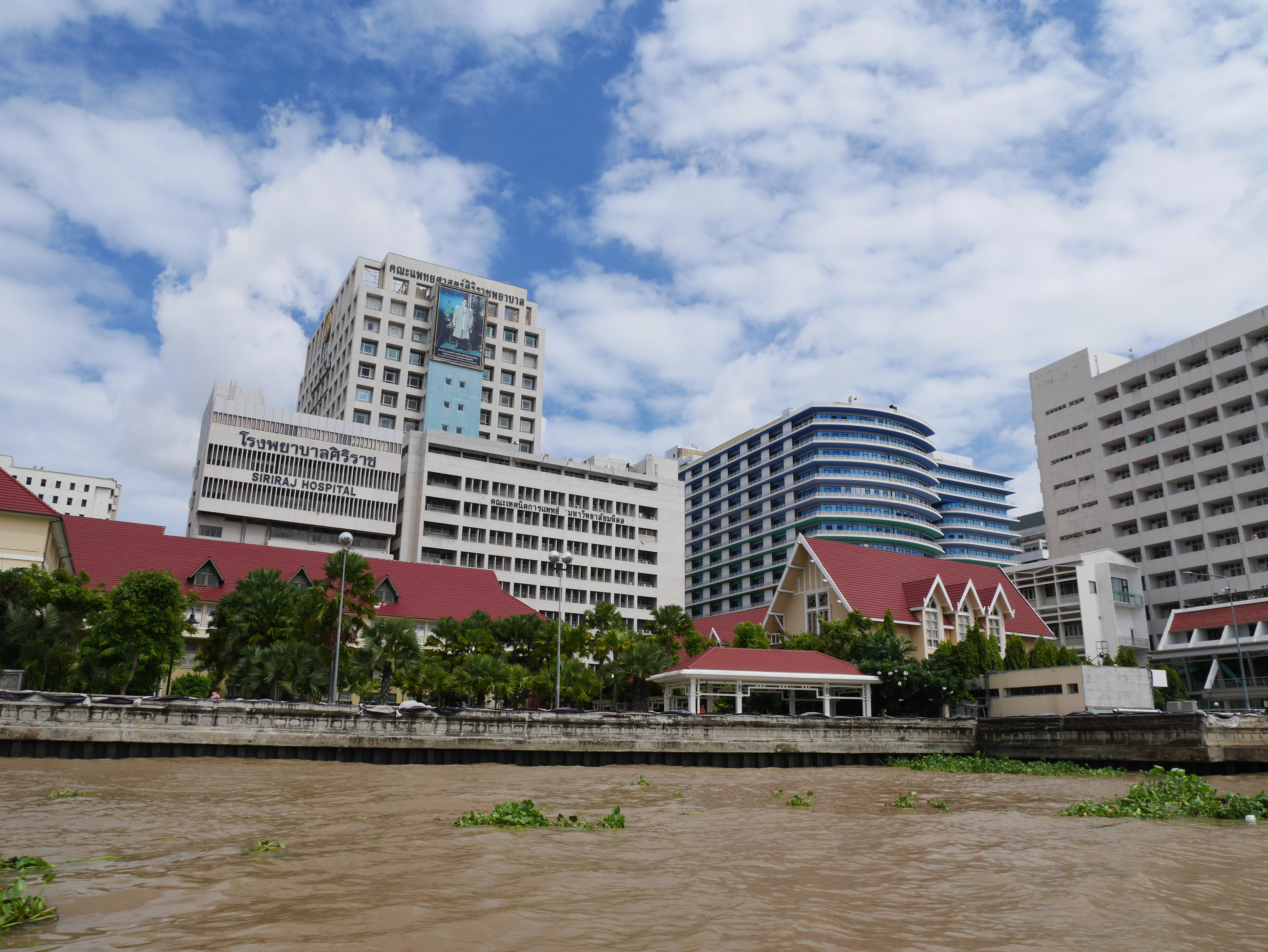 โรงพยาบาลศิริราช